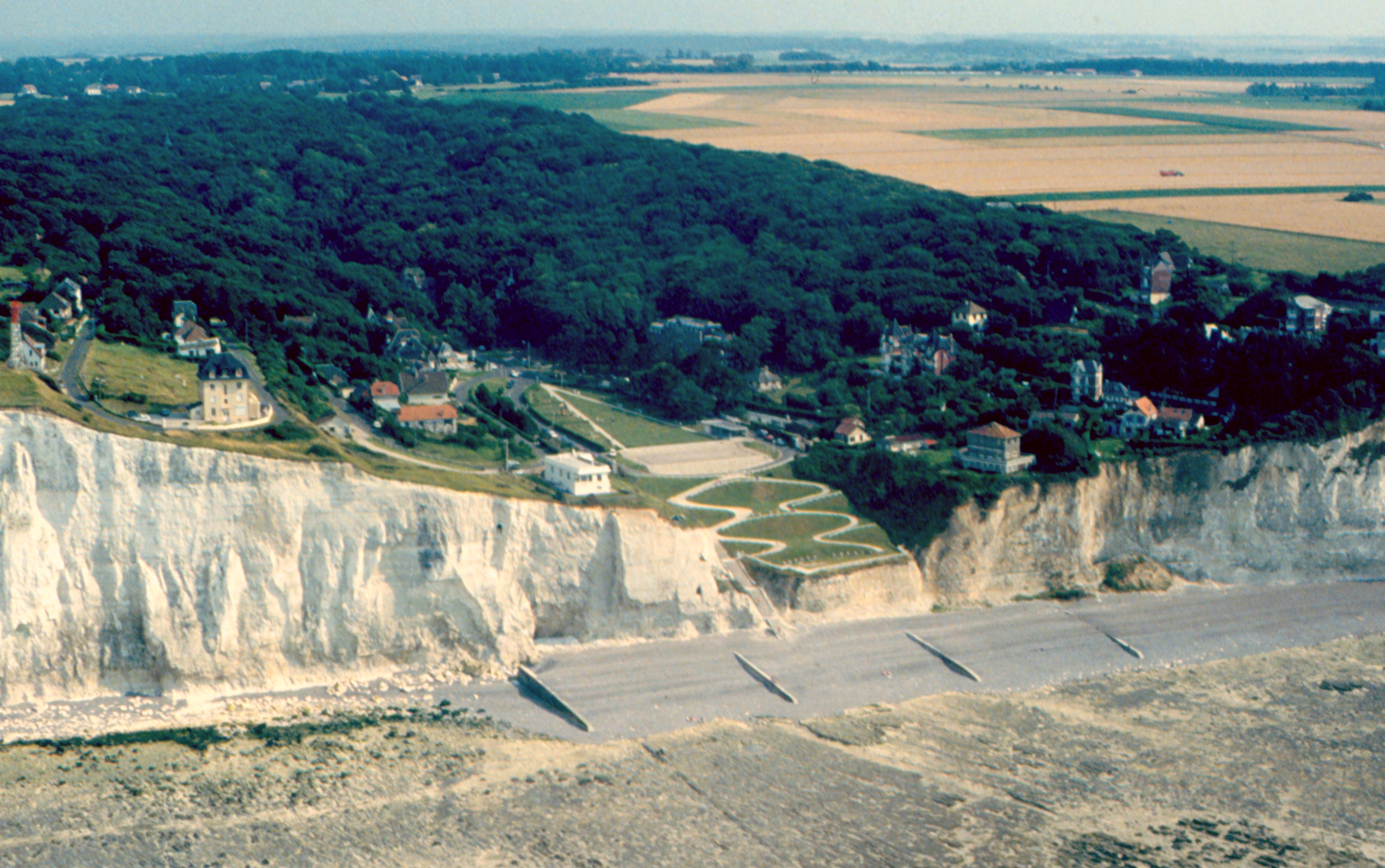 Ault, Le-Bois-de-Cise an der Steilküste